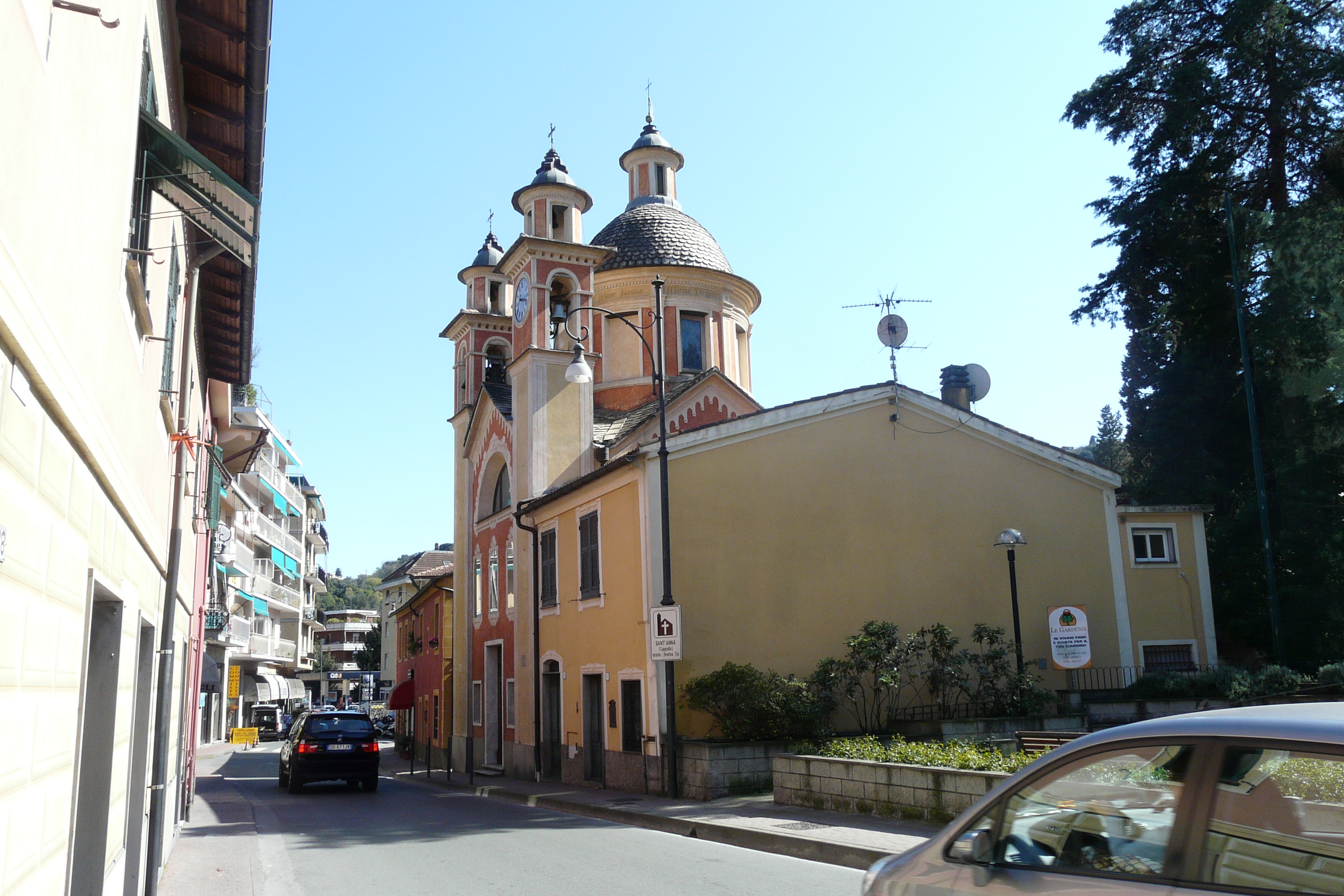 Chiesa di Sant'Anna, Rapallo, Liguria, Italia